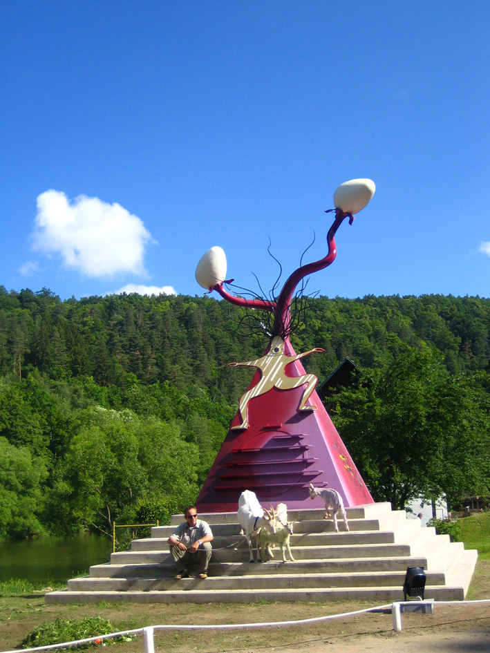 Kosmicky načasovaná parapyramidální potence, kov